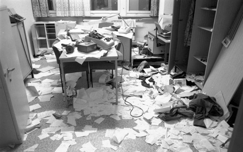 Berlin, Stasi-Zentrale gestürmt ADN-ZB/Uhlemann/16.1.1990/Berlin: Stürmung AfNS-Zentrale/ Bei einer Demonstration vor dem Gebäude des ehemaligen AfNS in der Normannen-/ Ruschestraße, zu der das Neue Forum aufgerufen hatte, stürmten Tausende von Haß und Rache erfüllte Bürger das bereits von einem Bürgerkomitee kontrollierte Gebäude und zerstörten Einrichtungen im Werte von Hunderttausenden Mark.